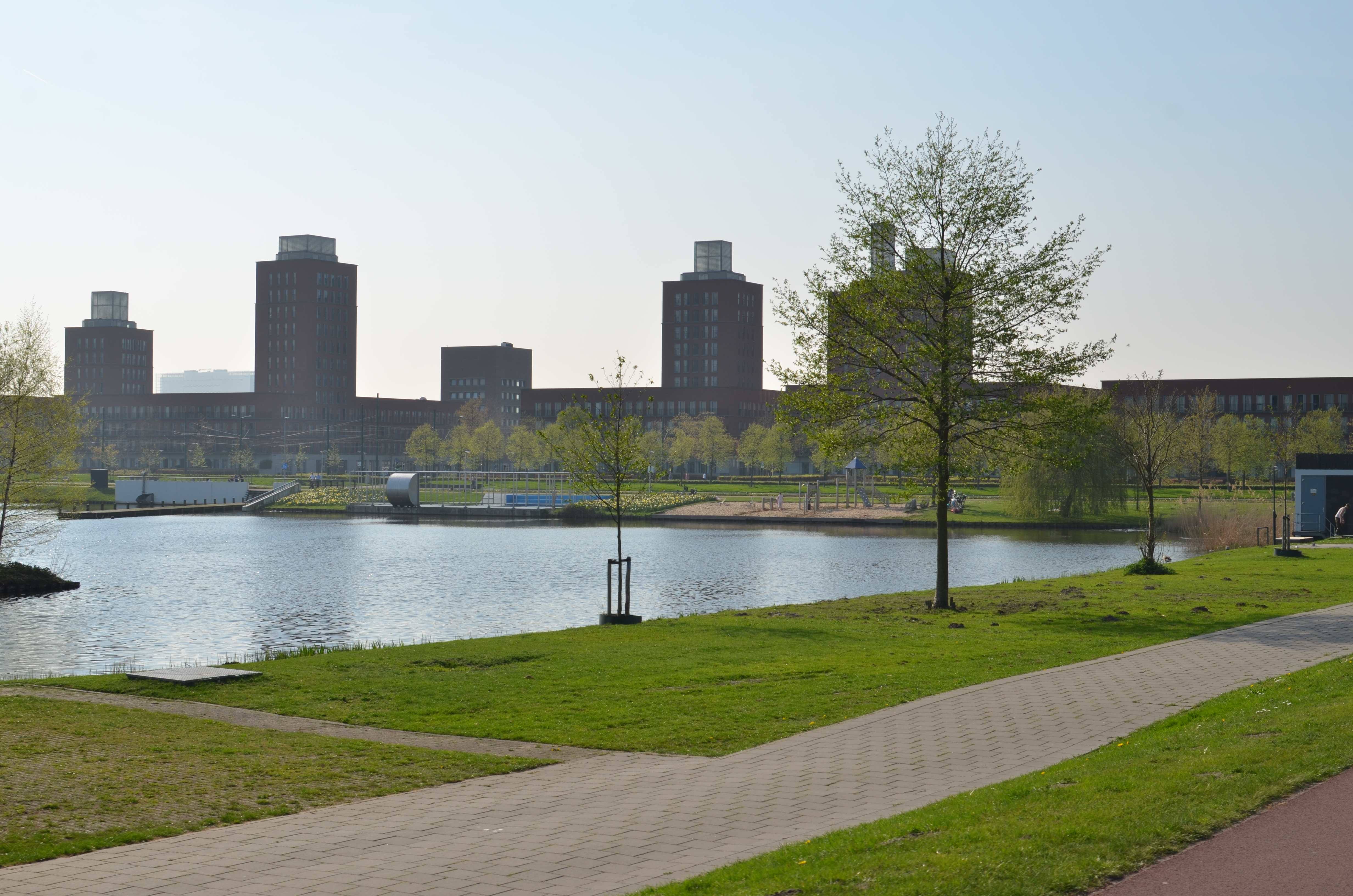 De Haagse wijk Ypenburg anno 2018.